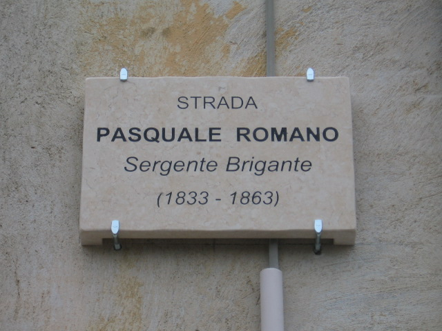 Strada Pasquale Romano - Sergente Brigante Villa Castelli (Brindisi)